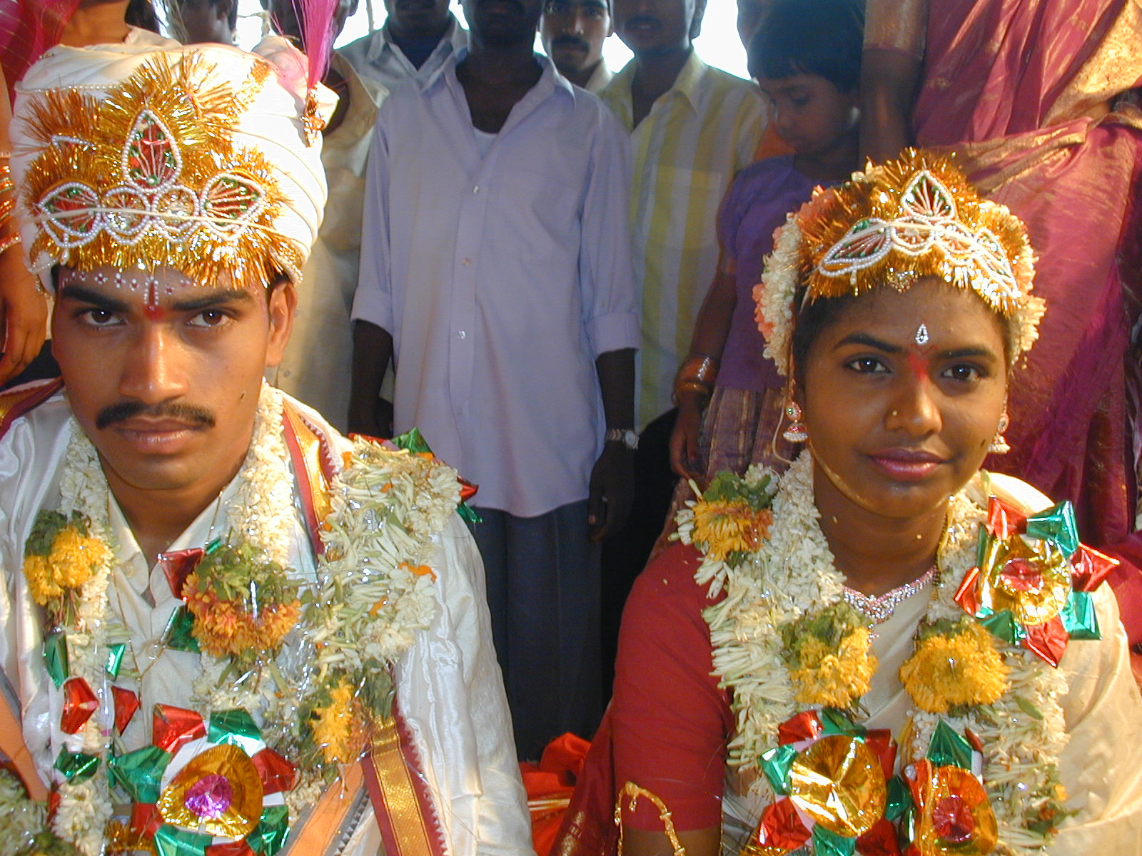 ハイデラバードの人々